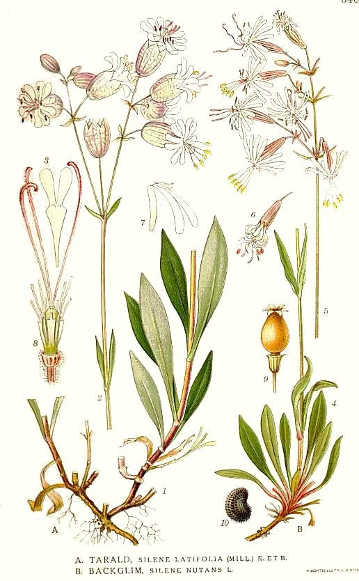 A. Silene vulgaris (Moench) Garcke B. Silene nutans L. Original Description A. Tarald, Silene latifolia (Mill.) R. et B. B. Backglim, Silene nutans L.